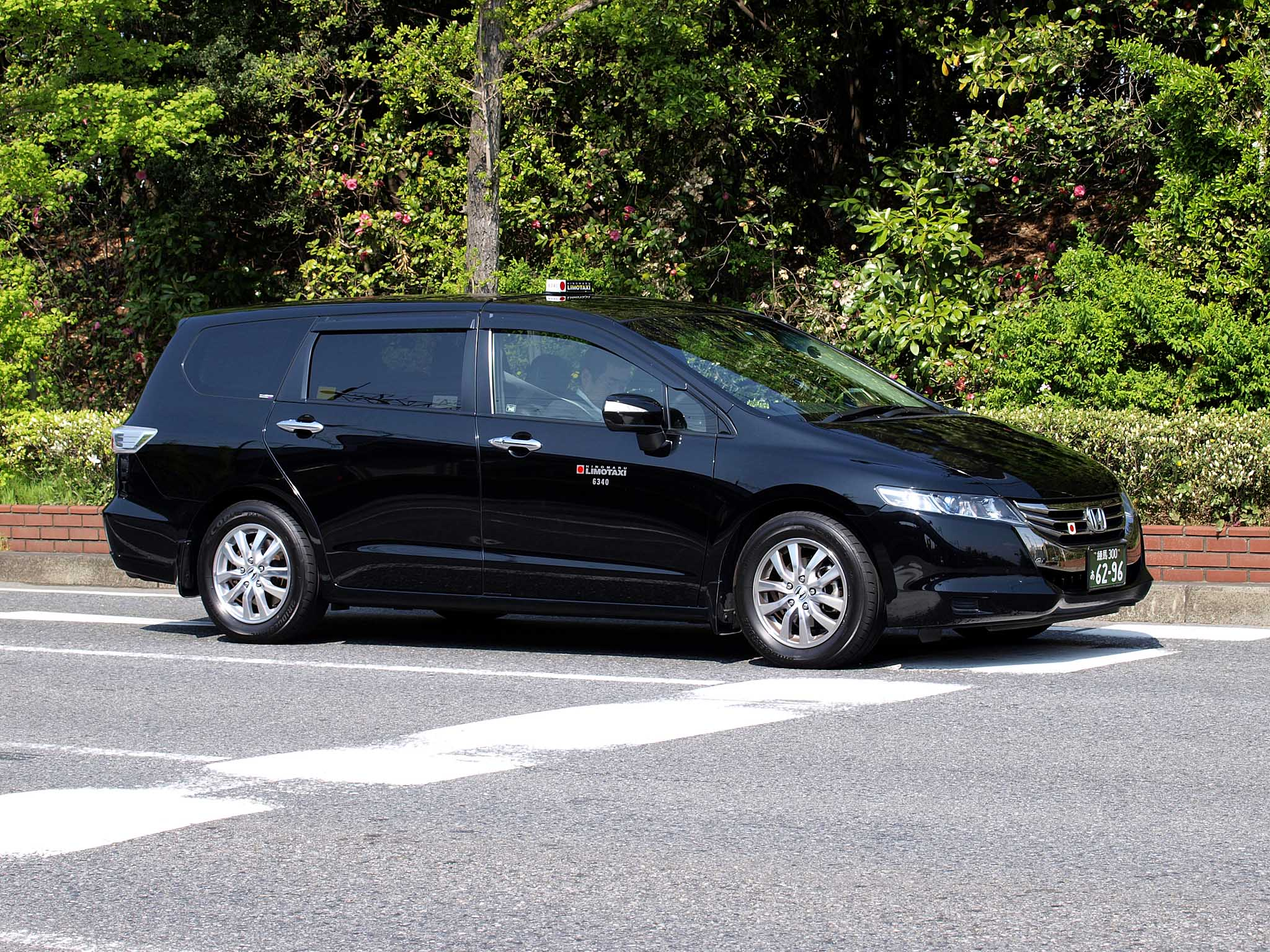 日の丸リムジンのホンダ・オデッセイ。 登録番号：練馬300あ6296 撮影地：千葉県浦安市富岡